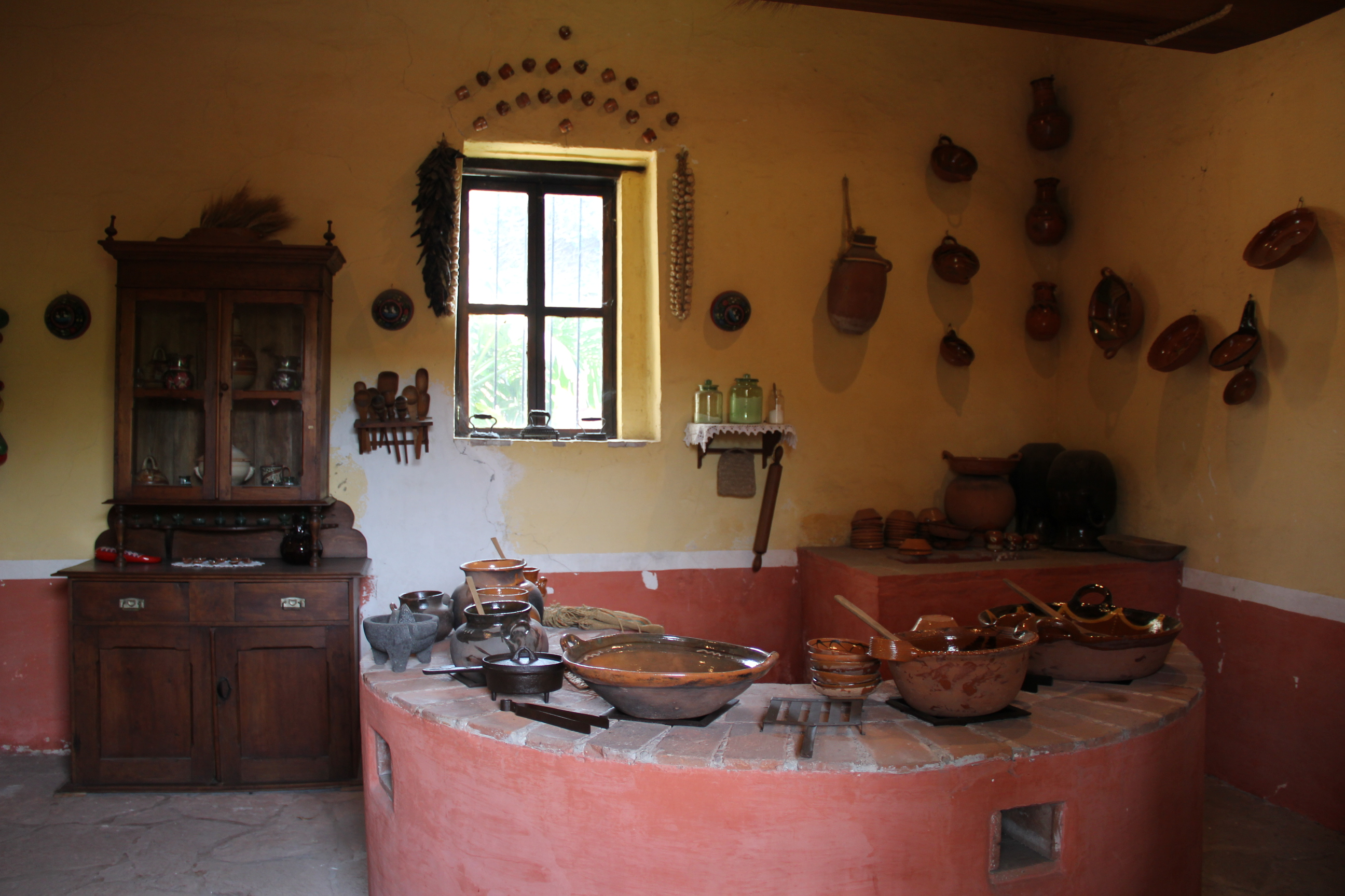 En el museo de sitio de Santa Cecilia Acatitlán se presenta la recreación de una hacienda pulquera del S. XVII